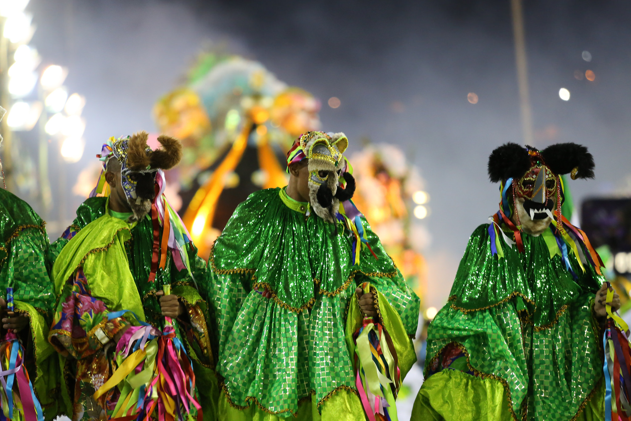 Rio de Janeiro - Escolas de samba se apresentam no último dia de desfiles do carnaval. (Tata Barreto/Agência Brasil)